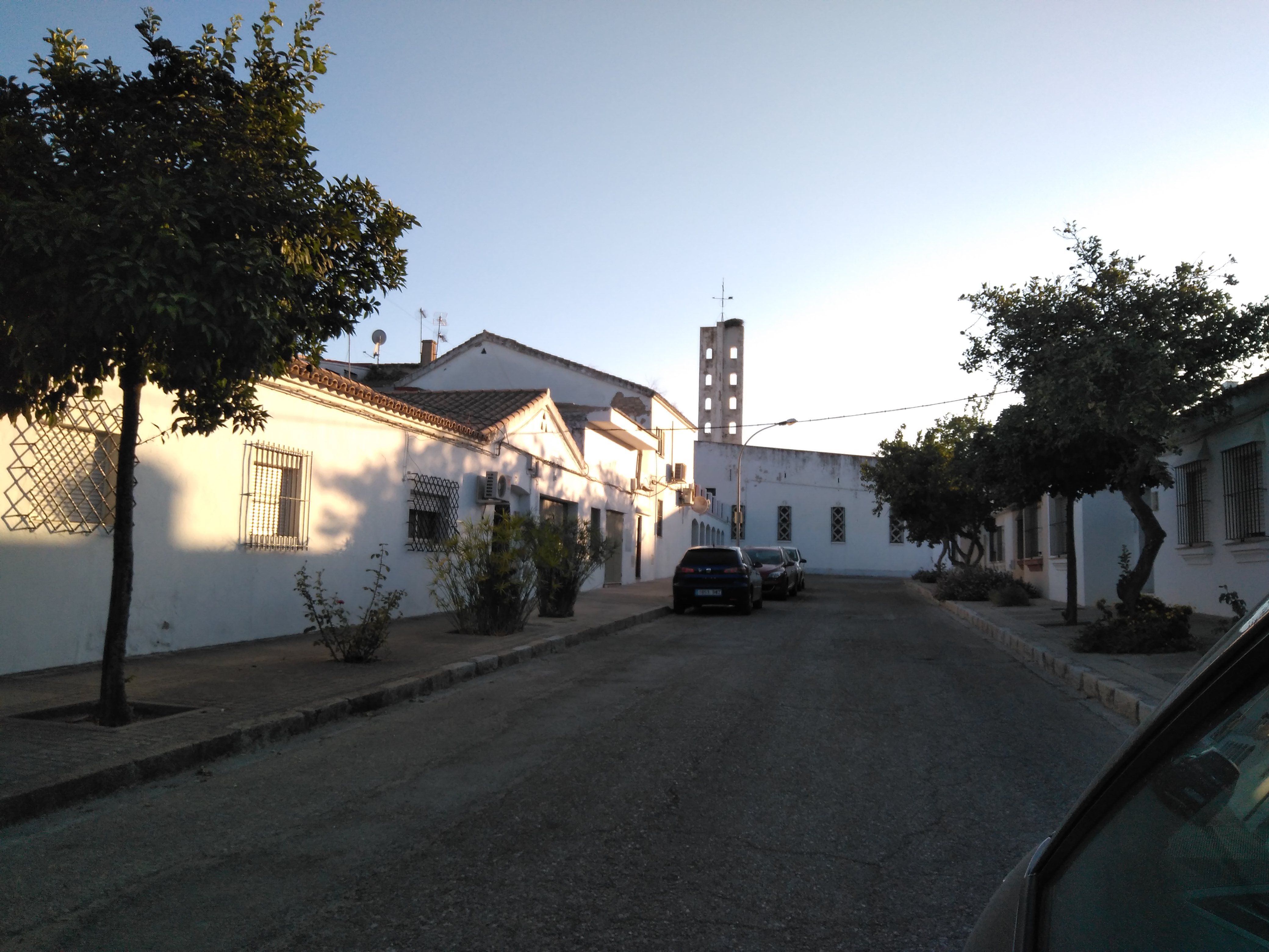 Torre de la Iglesia de San Miguel en semi-ruina. Estrella del Marqués. Jerez, España